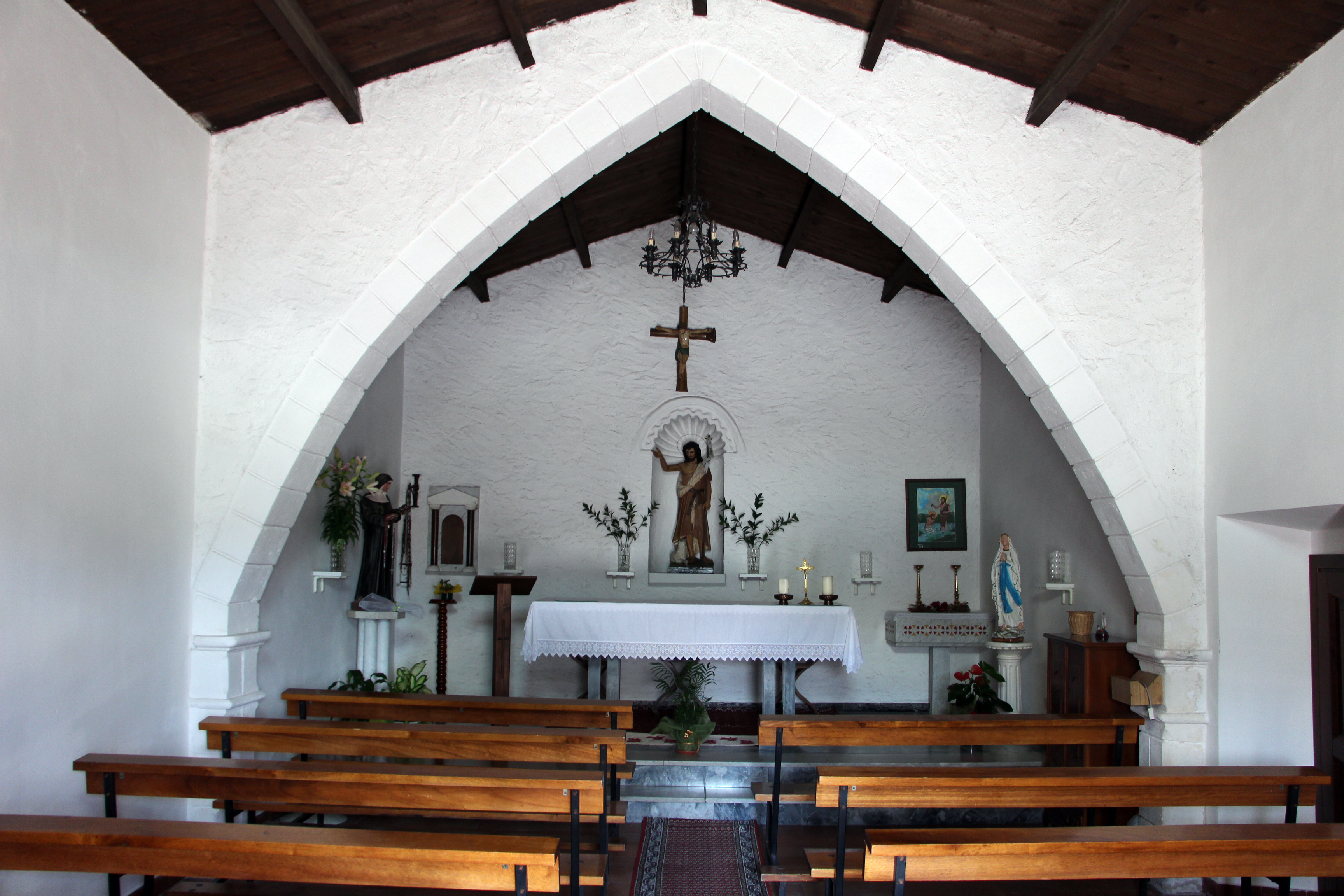 Perfugas